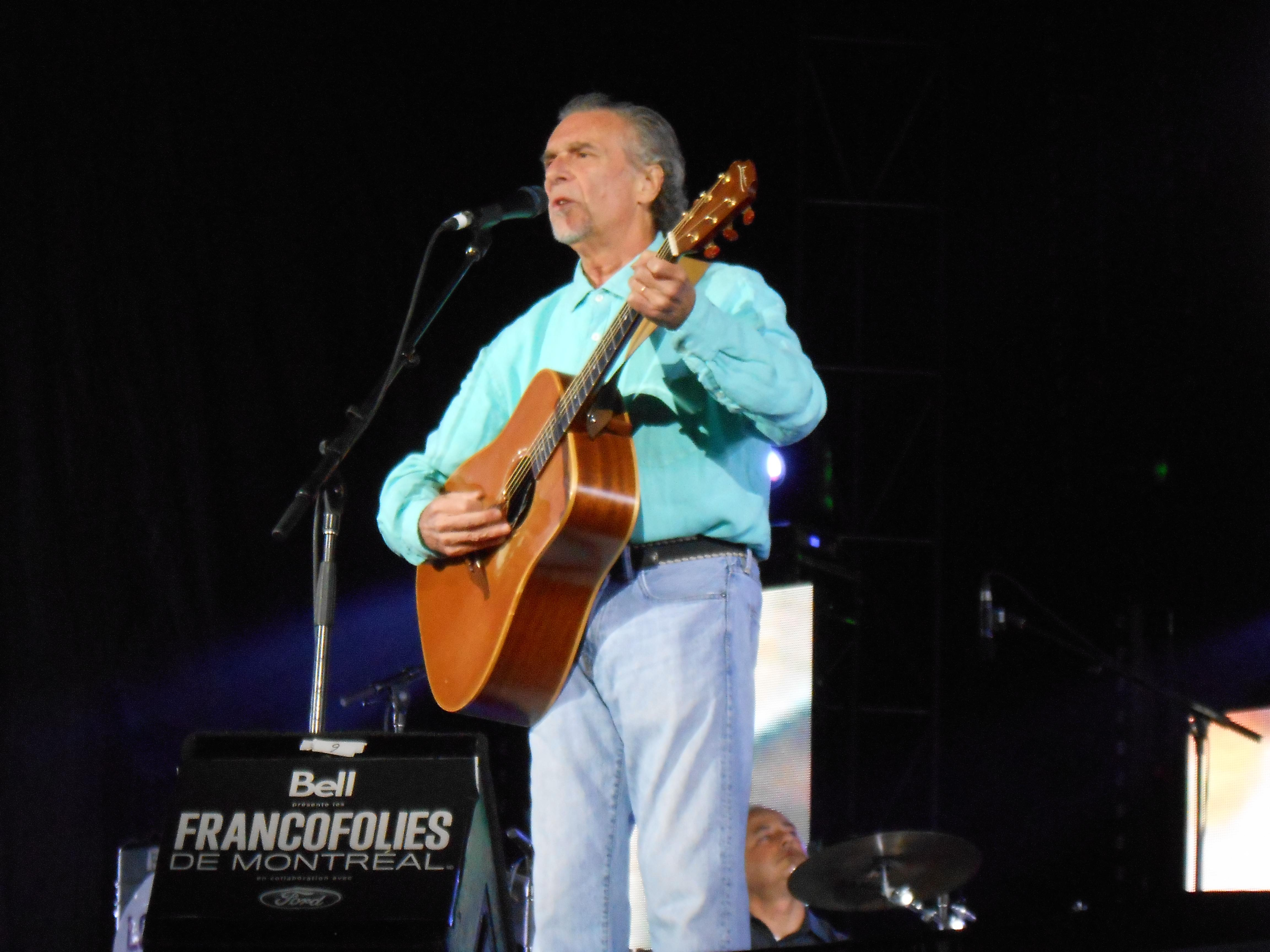 Zachary Richard a offert une performance aux FrancoFolies de Montréal, le 19 juin 2013, à la place des Festivals.